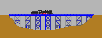 Gerüstpfeilerbrücke